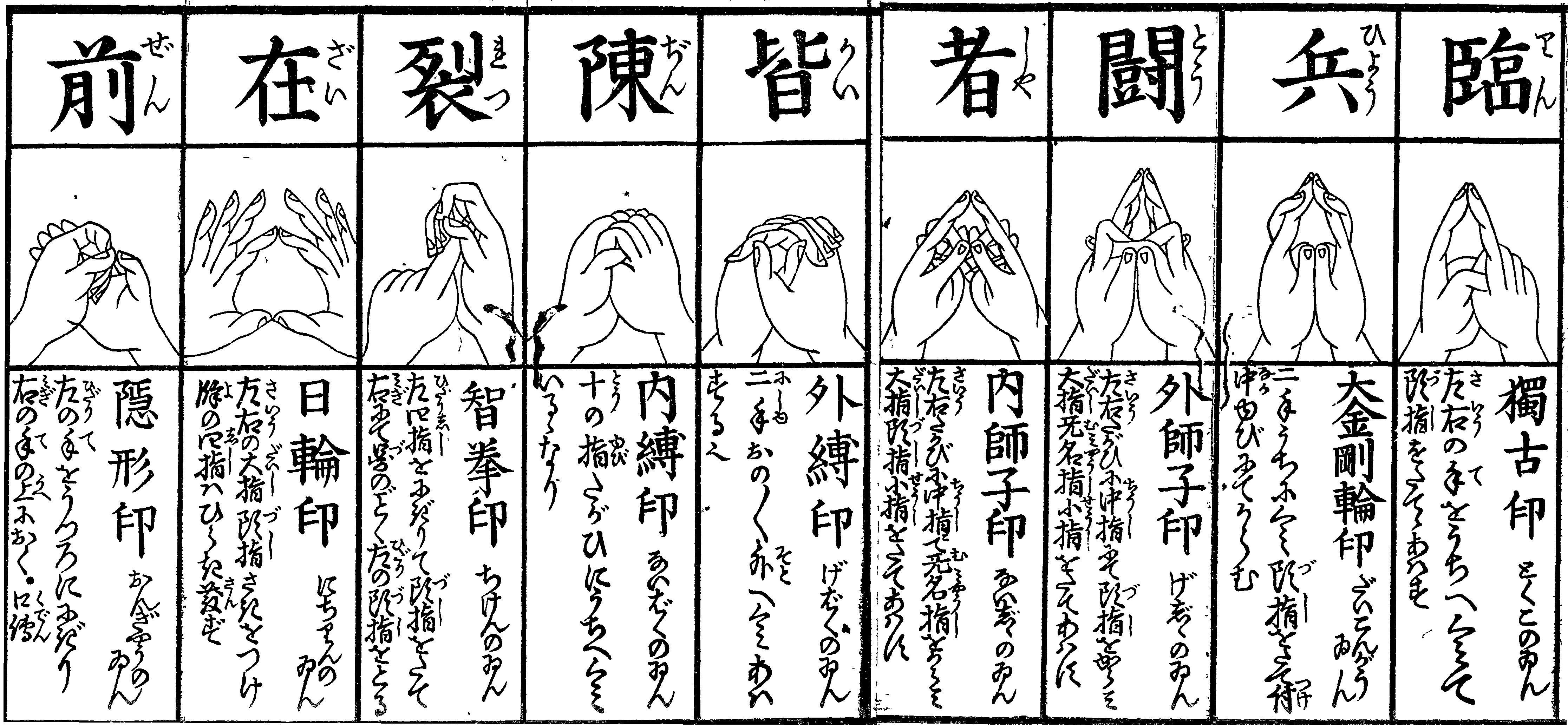 九字（『九字護身法』 博文堂庄左衛門 1881年2月）